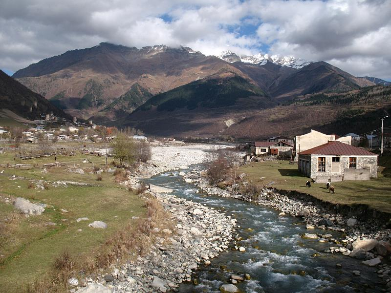 Een verzameling van 10 dorpen, de grootste plaats in de regio Svaneti